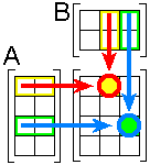 Diagram of matrix multiplication. Created by Tarquin. SVG version available on request. Image:Schéma de la multiplication des matrices.png